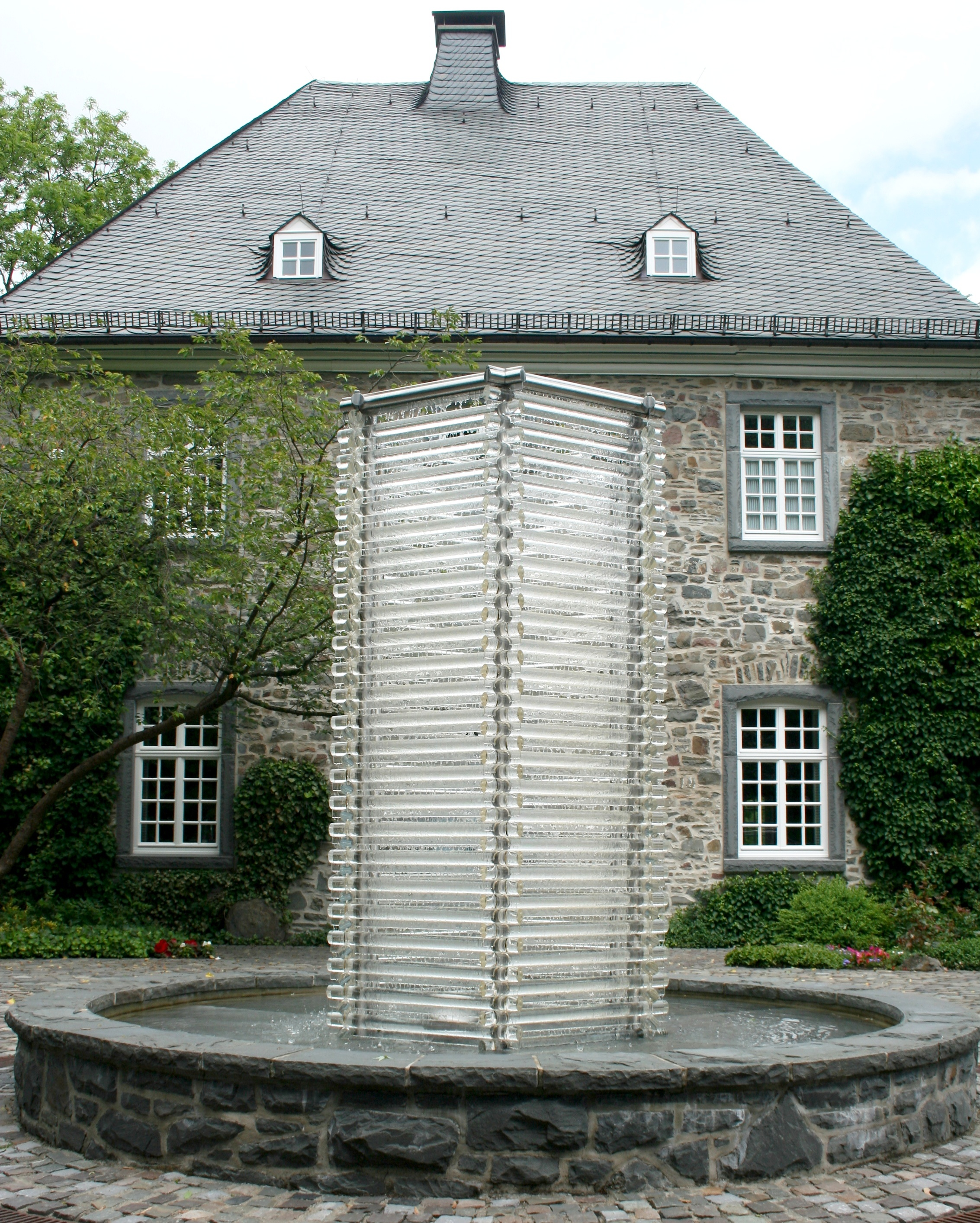 "Gläserner Brunnen" von Friedrich Becker von dem Burgmannshof in Meschede-Grevenstein.